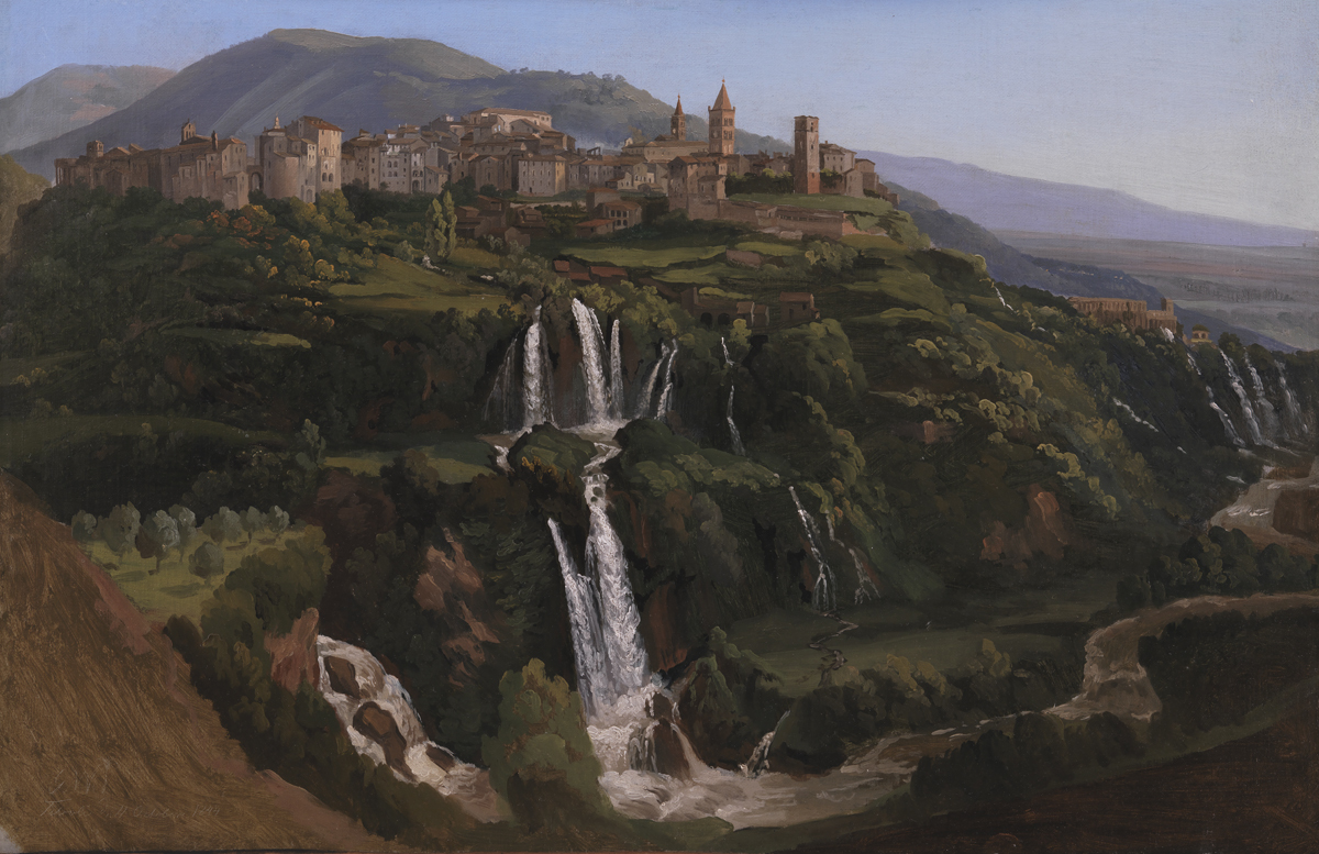 Gustaf Palm (1810-1890), Udsigt mod Tivoli i Italien, 1844-10-11